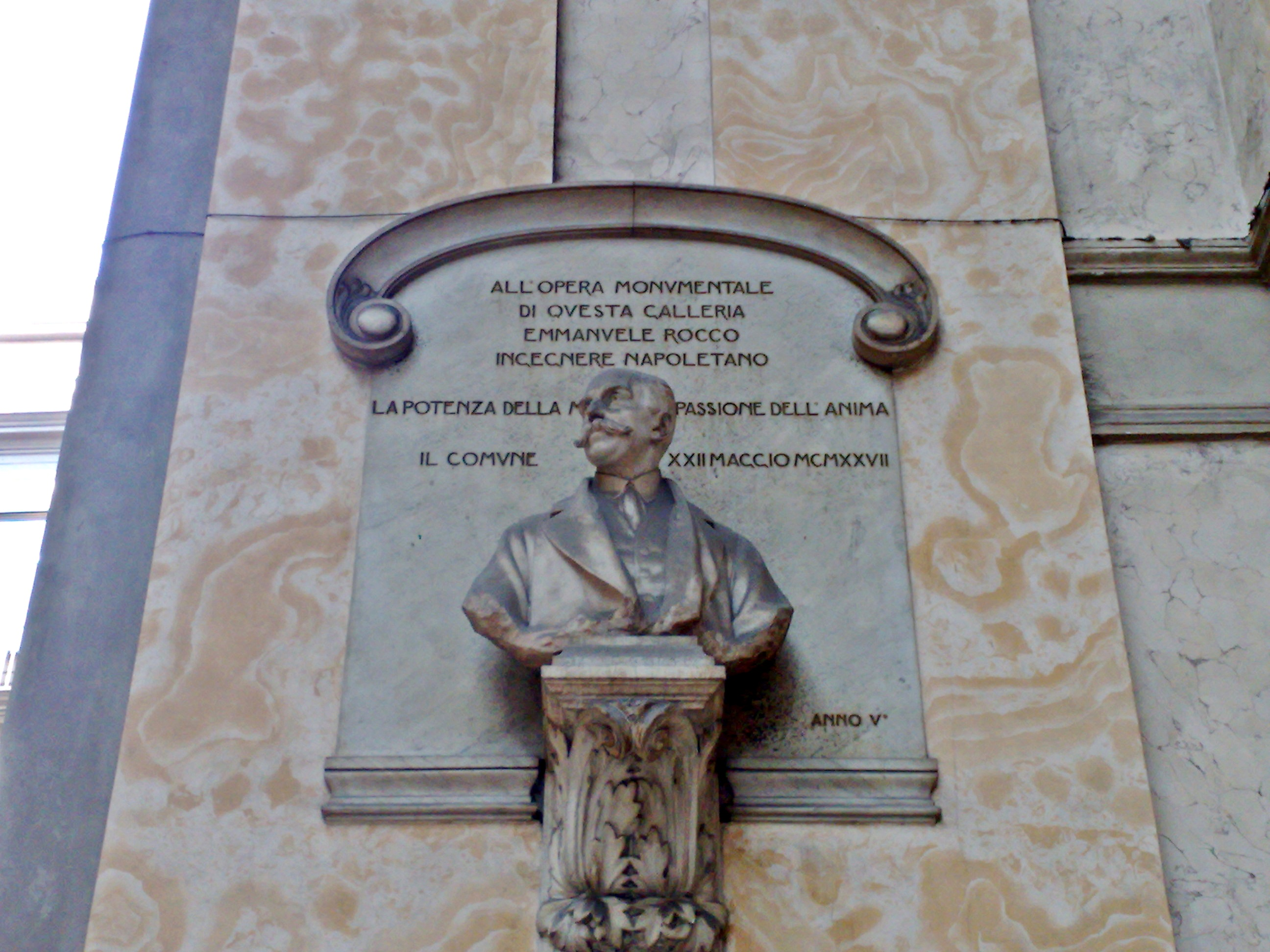 Targa posta dentro la Galleria Umberto I di Napoli dedicata all'ingegnere Emmanuele Rocco.